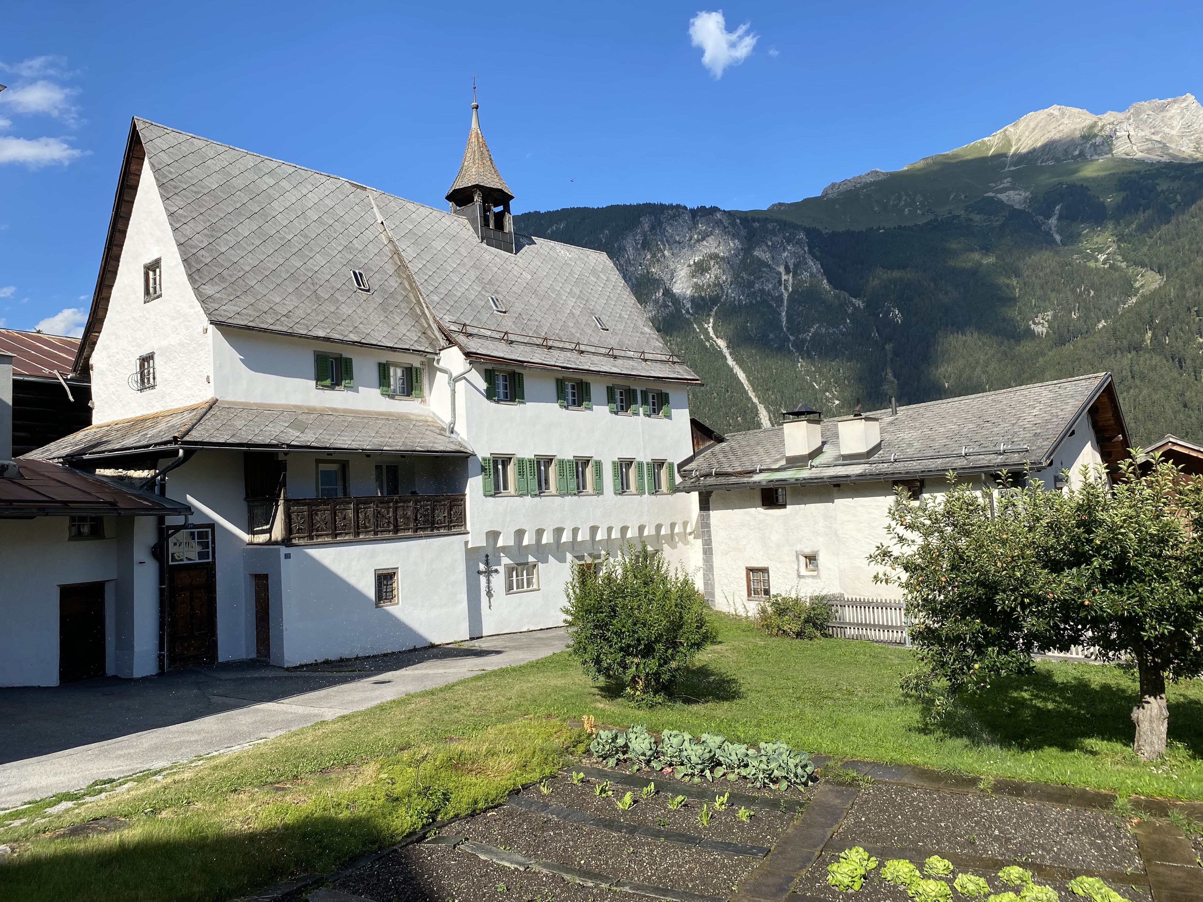 Kapuziner Hospiz Salouf im Kanton Graubünden (Schweiz). Erbaut um 1750. Heute Kapelle und Pfarrhaus.